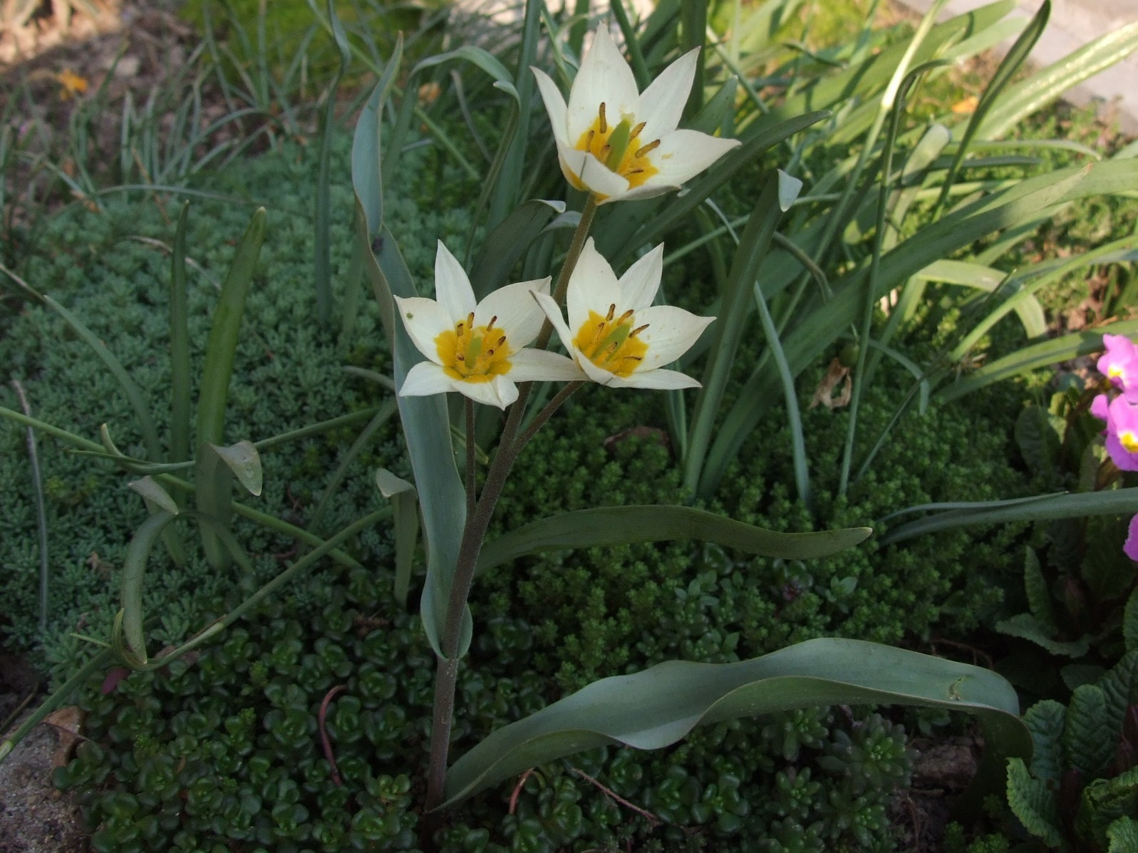 Tulipa turkestanica